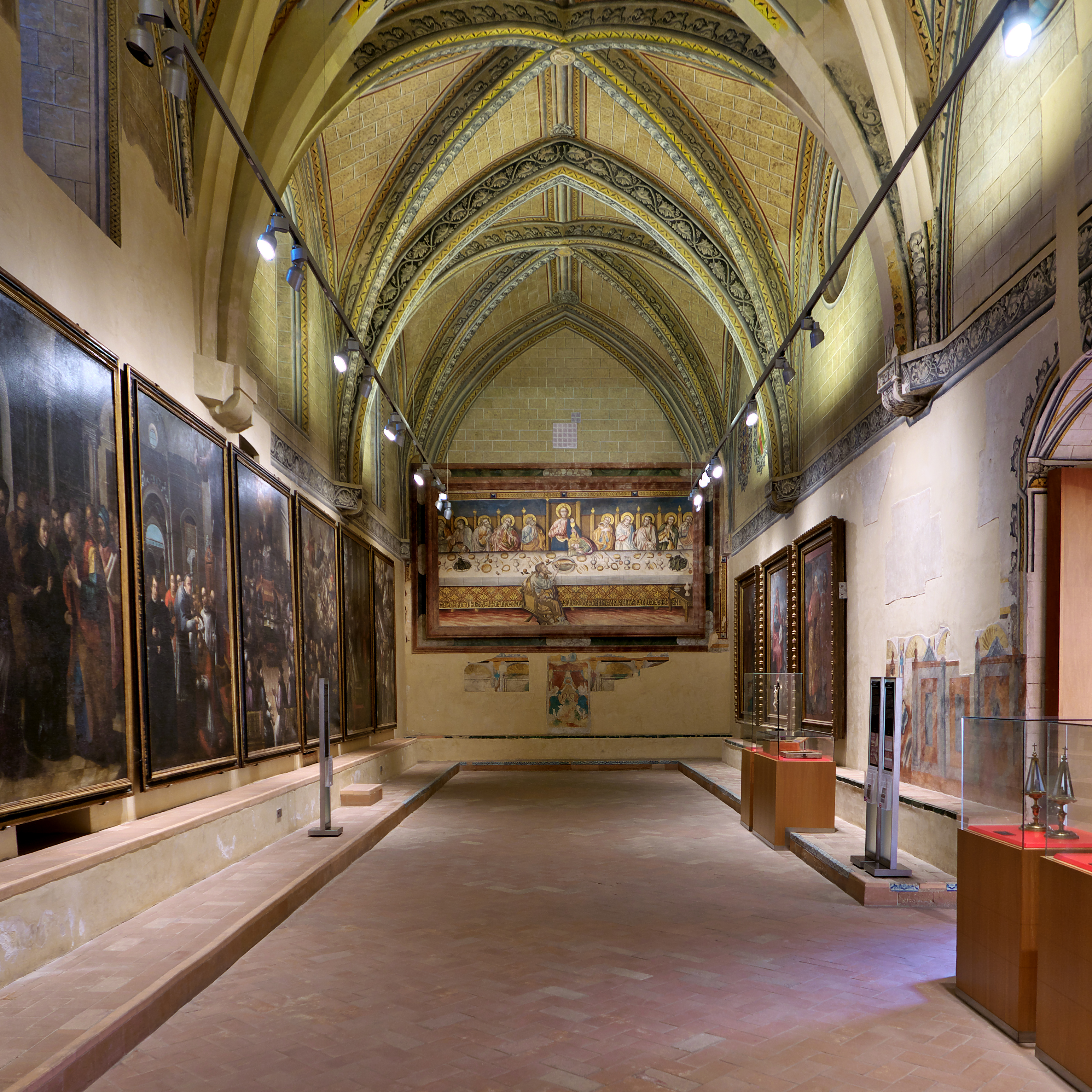 Situado en la galería oeste del Claustro de los Muertos. En el testero norte una interesante pintura mural de la Última Cena, último cuarto del siglo XV.